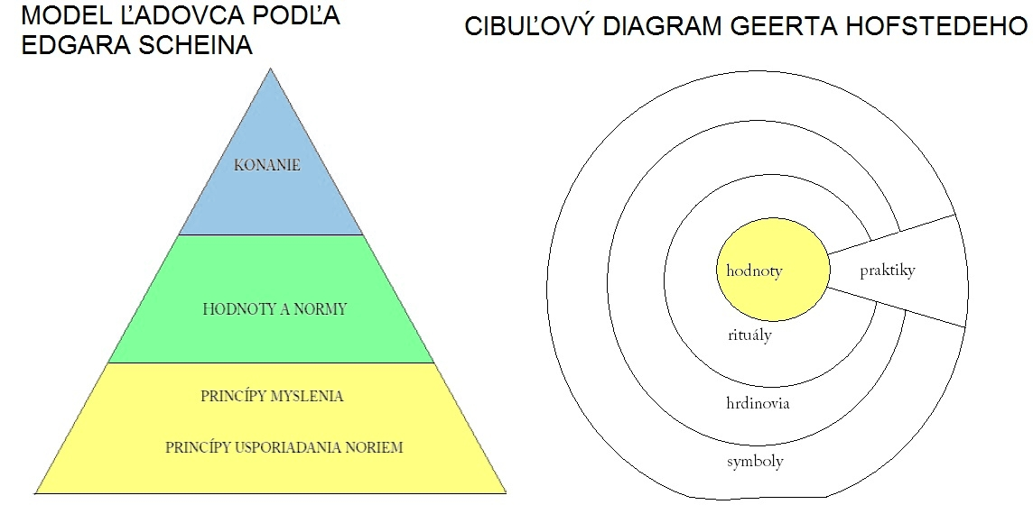 Scheinov model ľadovca Hofstedeho cibuľový diagram